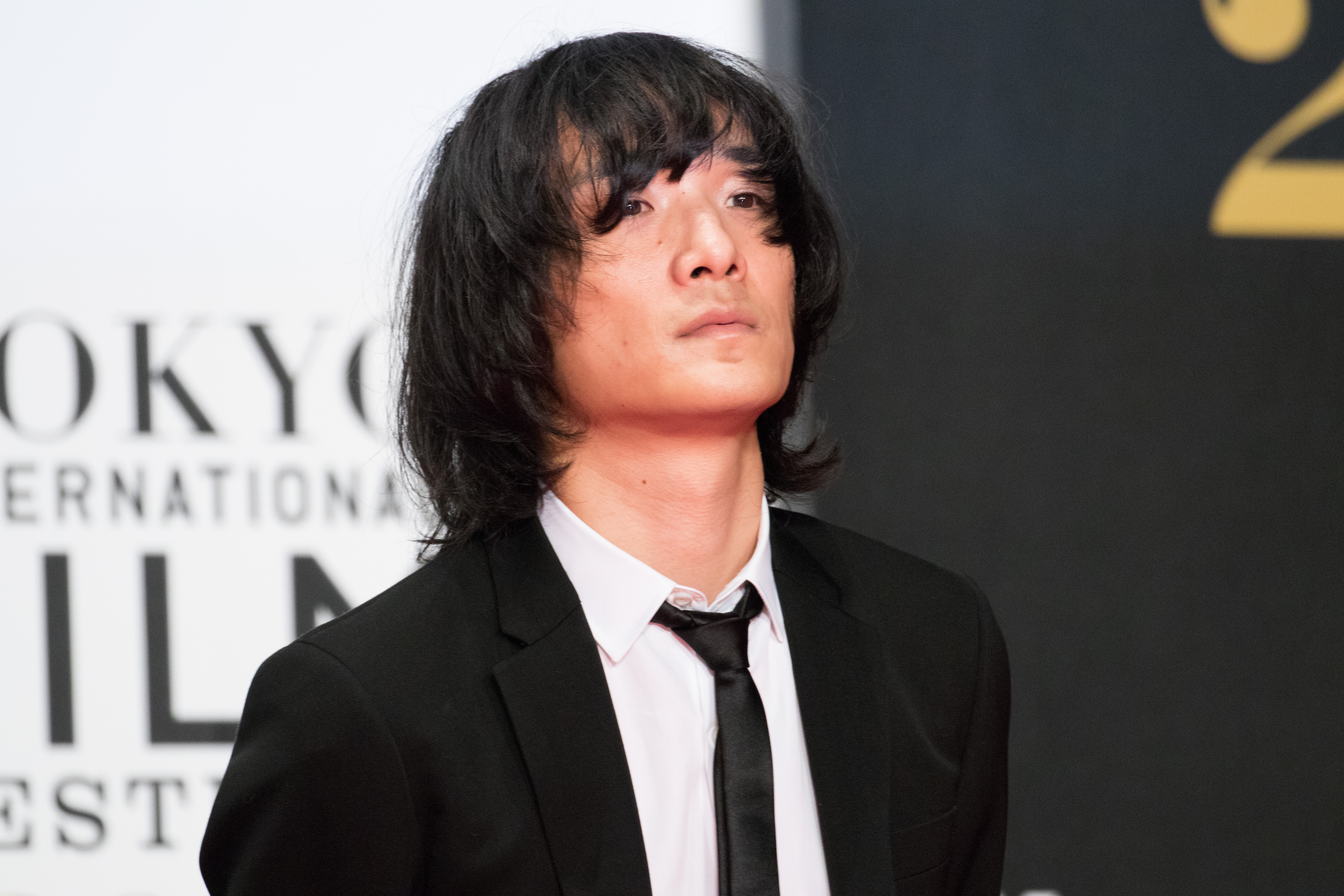 第29回 東京国際映画祭 オープニングセレモニー 石崎ひゅーい (アズミ・ハルコは行方不明)